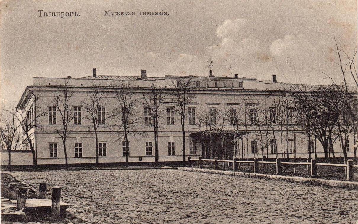 Таганрогская мужская гимназия